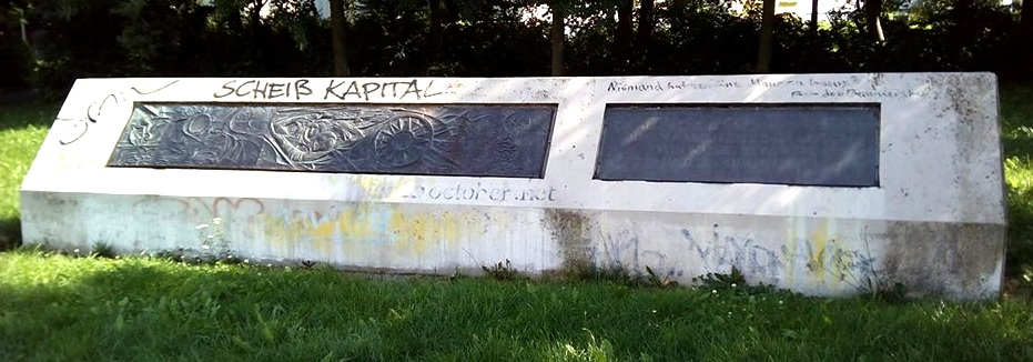 Aufstellort: Ecke Marchwitzastraße. Zustand august 2017.